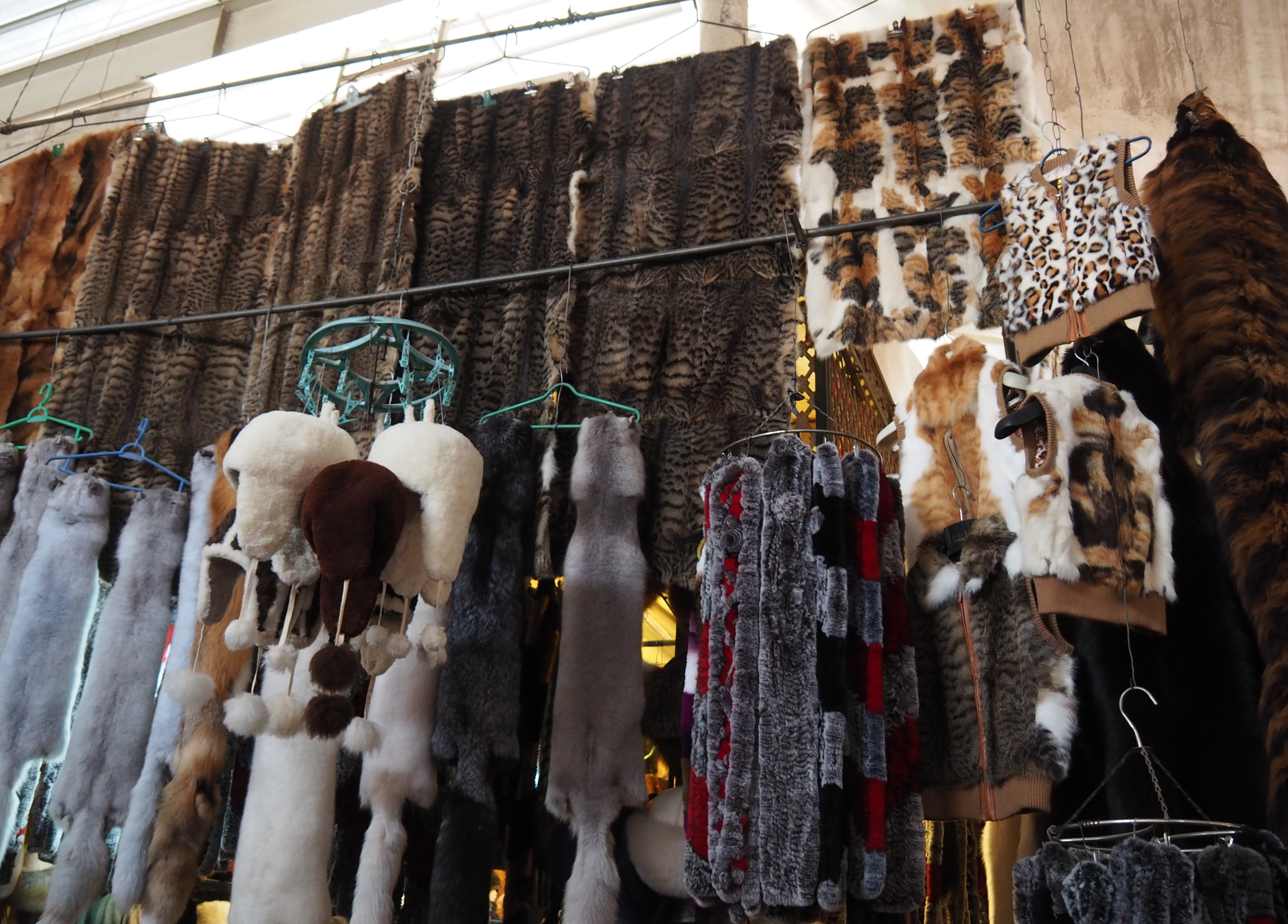 Kashgar Bazaar